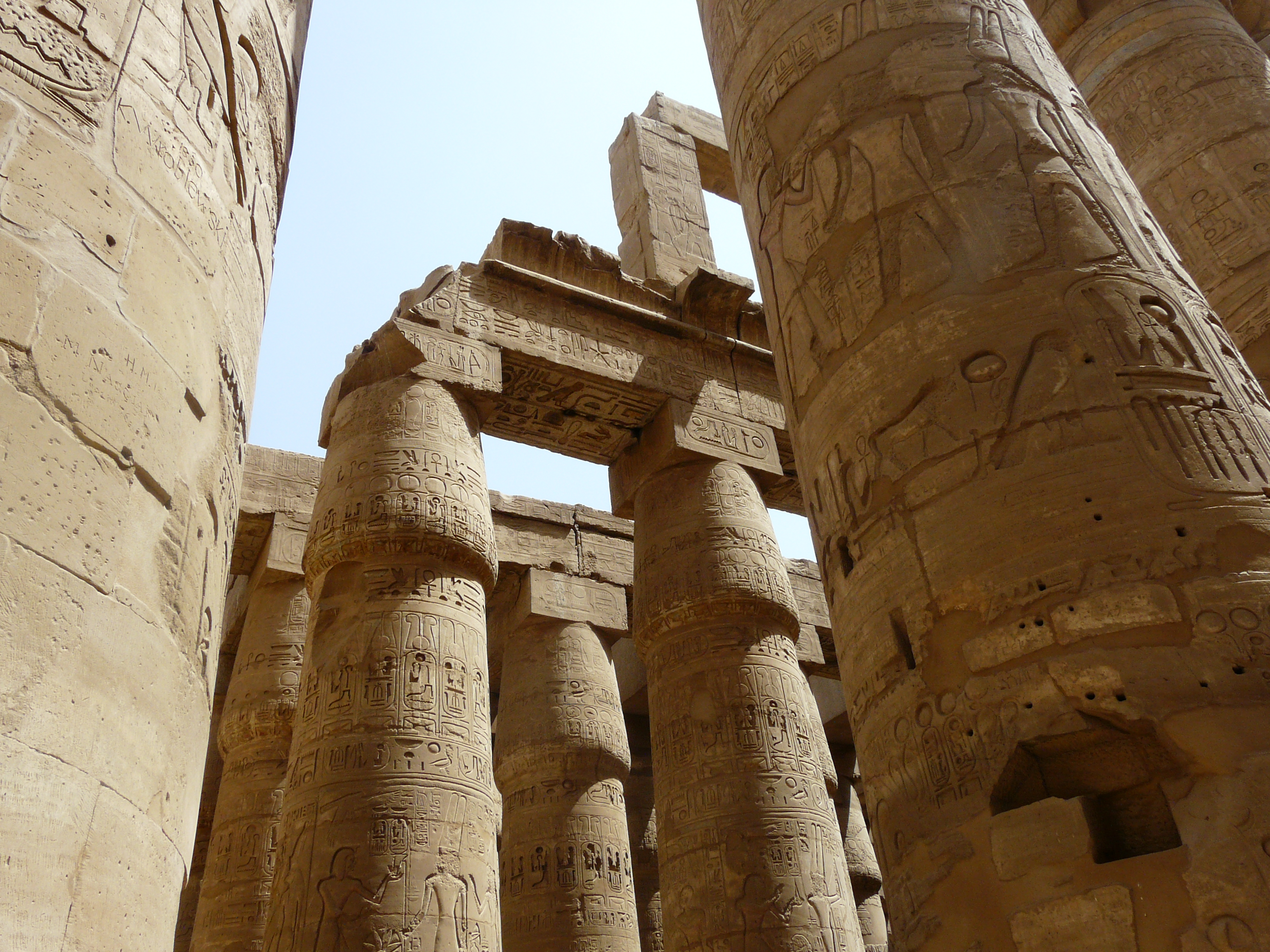 Karnak - Salle hypostyle